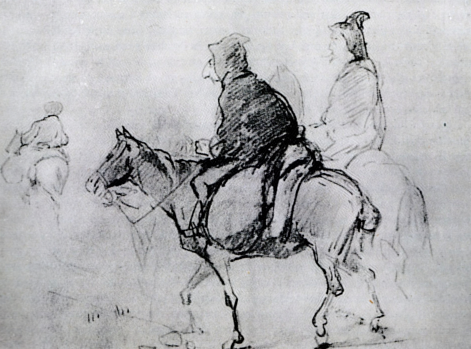 Pictorul Nicolae Grigorescu și Nae Bassarabescu în munți, creion, 14.5x20cm, nesemnat - Muzeul de Artă din Cluj